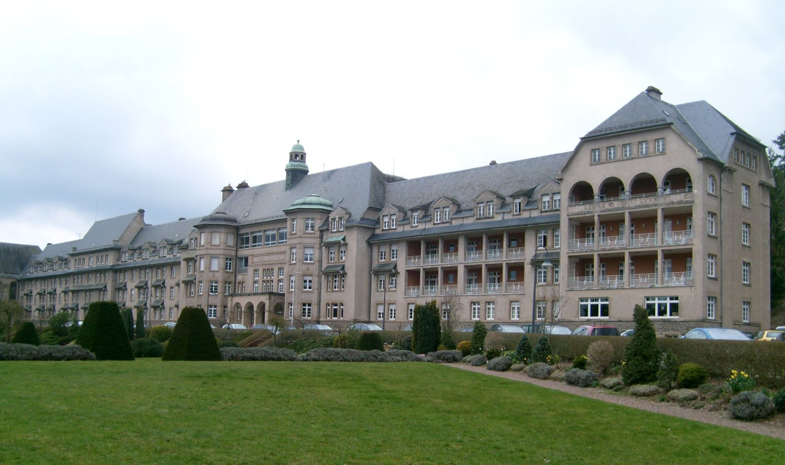 De Sanatorium beim Scheierhaff (Veianen) - 03.04.2008